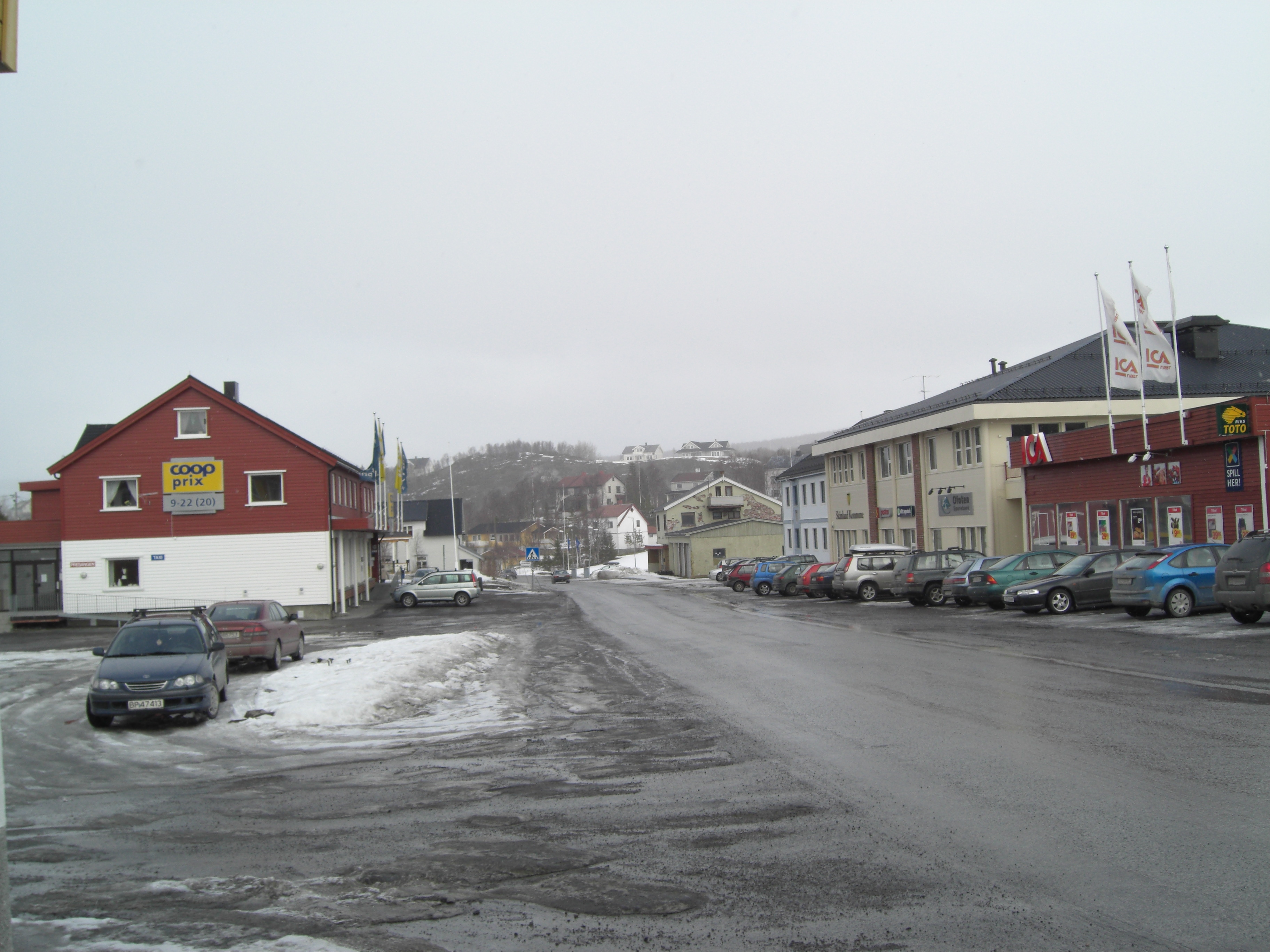 Center of Evenskjer, Norway